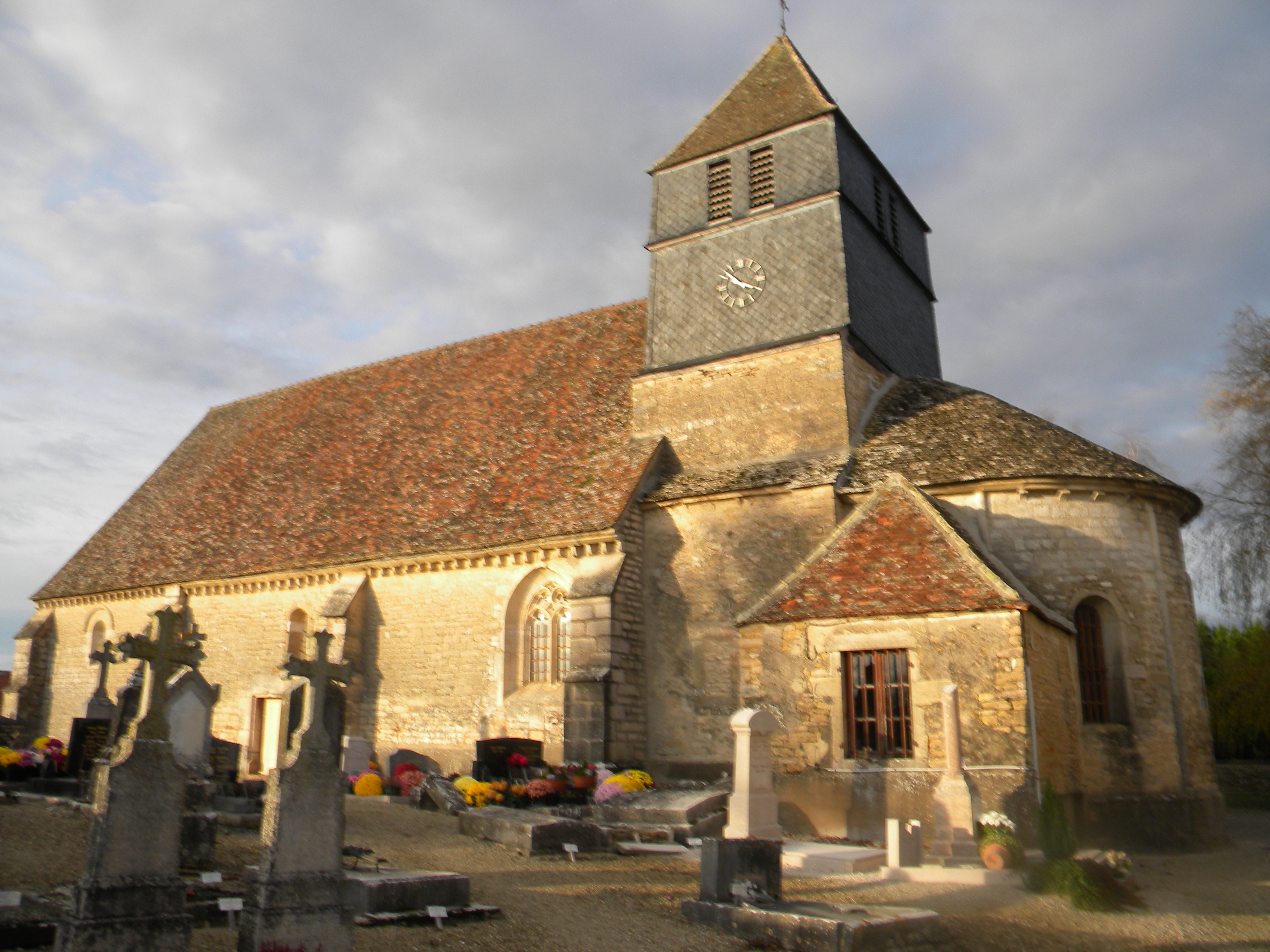 Eglise de Villy-le-Moutier